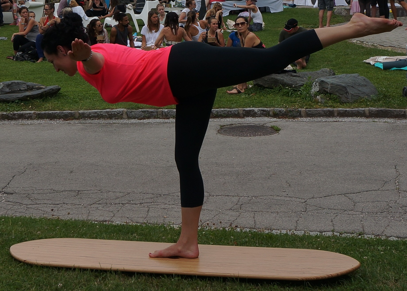 Das Yogaboard ist ein Balanceboard, mit dem Körperkontrolle und Balance trainiert werden kann. Das Board kann stehend, liegend oder sitzend verwendet werden. Durch die geschwungene Unterseite bekommt das Board einen idealen Wackeleffekt, was die gesamte Körpermuskulatur fordert.